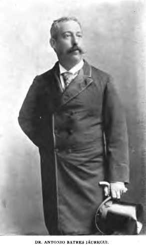 Dr. Antonio Batres Jauregui en 1896.